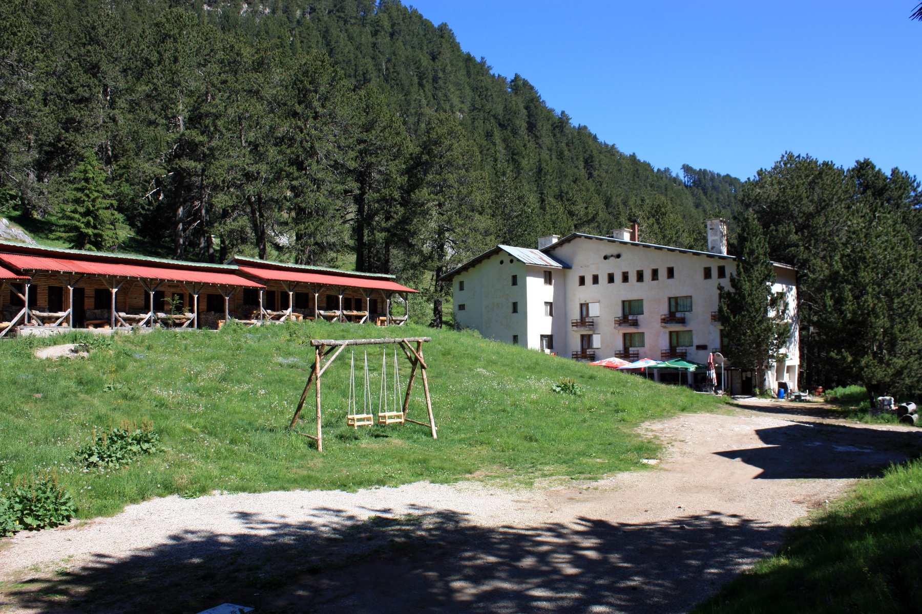 Piringebirge Hütte Banderitza auf 1811m. Von hier beginnt der grüne Wanderweg zum Wichren.